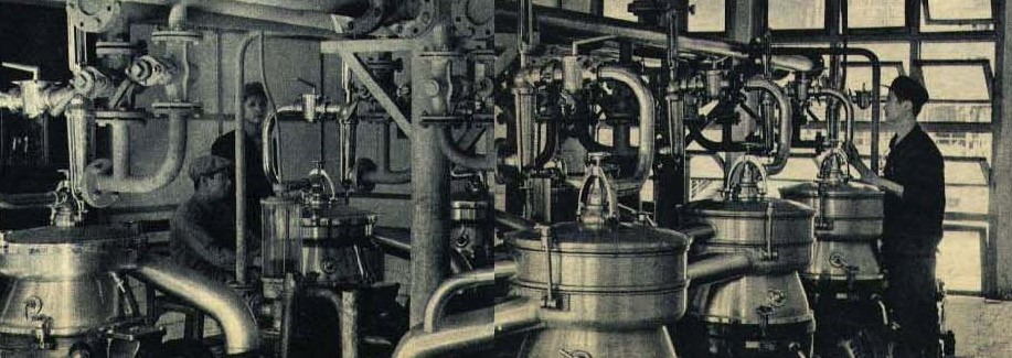 1962-07 1962年 甘蔗废糖蜜经高速离心机可以提取出酵母